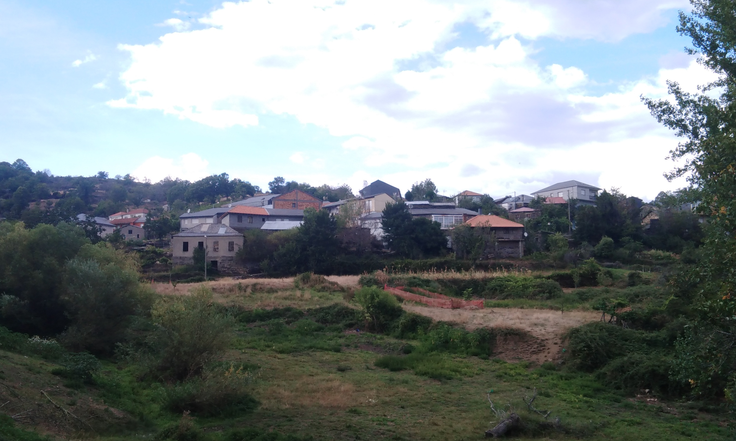 Vista da aldea de Pentes (A Gudiña)